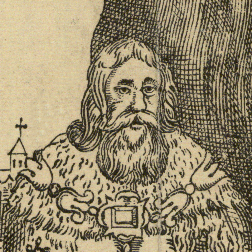 "Drzewo genealogiczne rodów: Tarnowskich, Melsztyńskich i Jarosławskich", fragment z podobizną Spicymira Leliwity Melsztyńskiego. Augustinus Thille (miedzioryt 1644), tekst Albert Kazimierz Jastrzębski vel Albert Casimirus Jastrzębski; przedruk Adam Piliński (homeografia wg miedziorytu, Paryż, 1872)